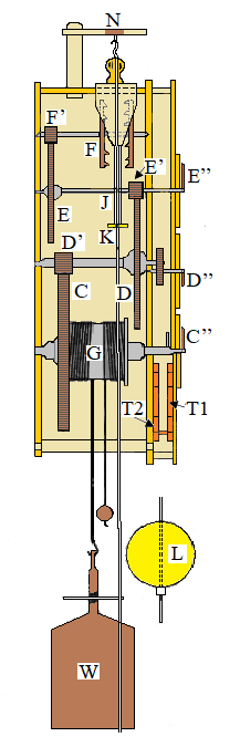 伊能忠敬が使用した垂揺球儀の側面図。大谷亮吉編著『伊能忠敬』岩波書店、1917年、p.403の図をもとに作成。